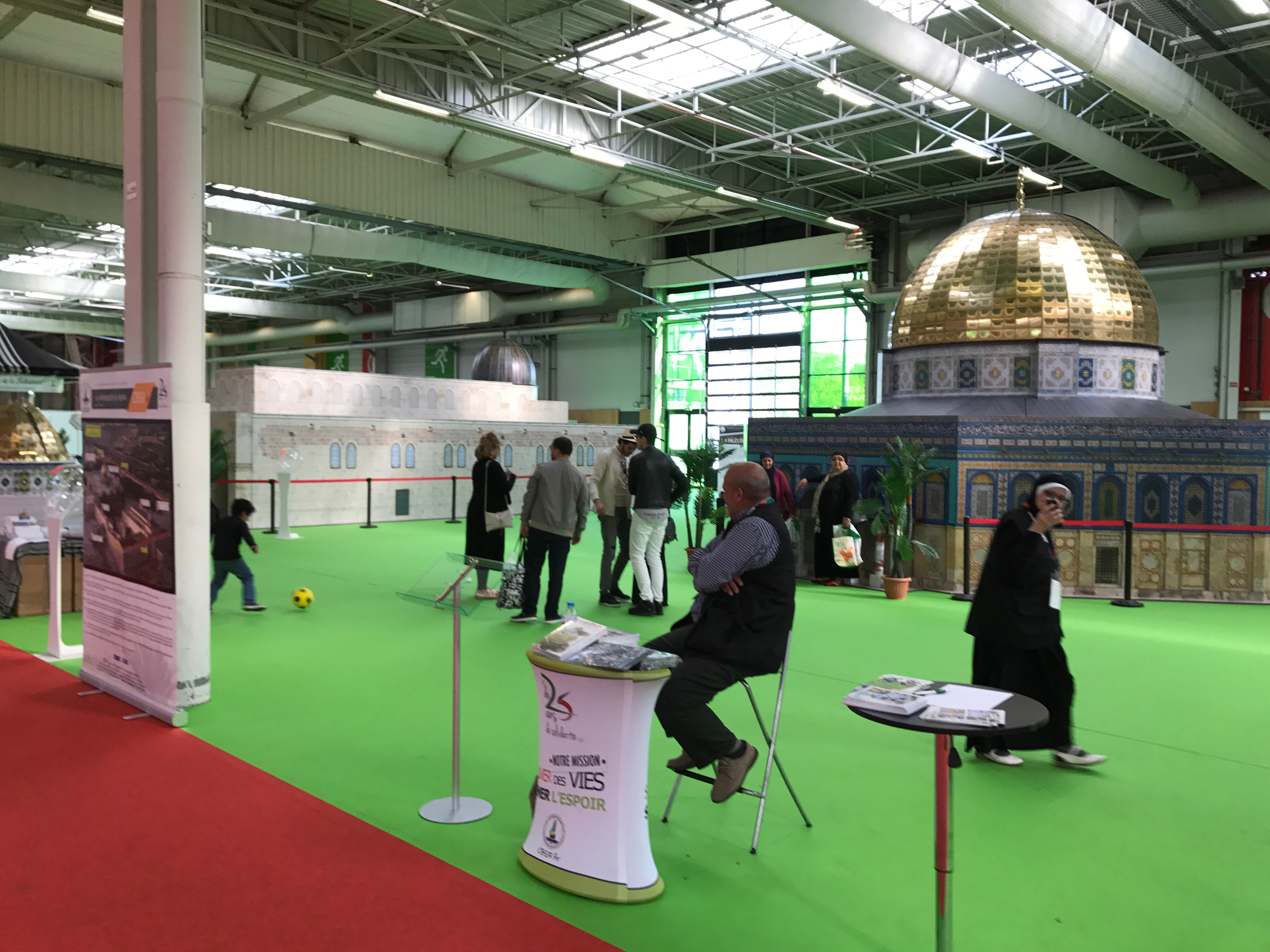 Maquette Dôme du Rocher, Stand CBSP, Rencontre annuelle des musulmans de France, avril 2017, Paris Le Bourget.